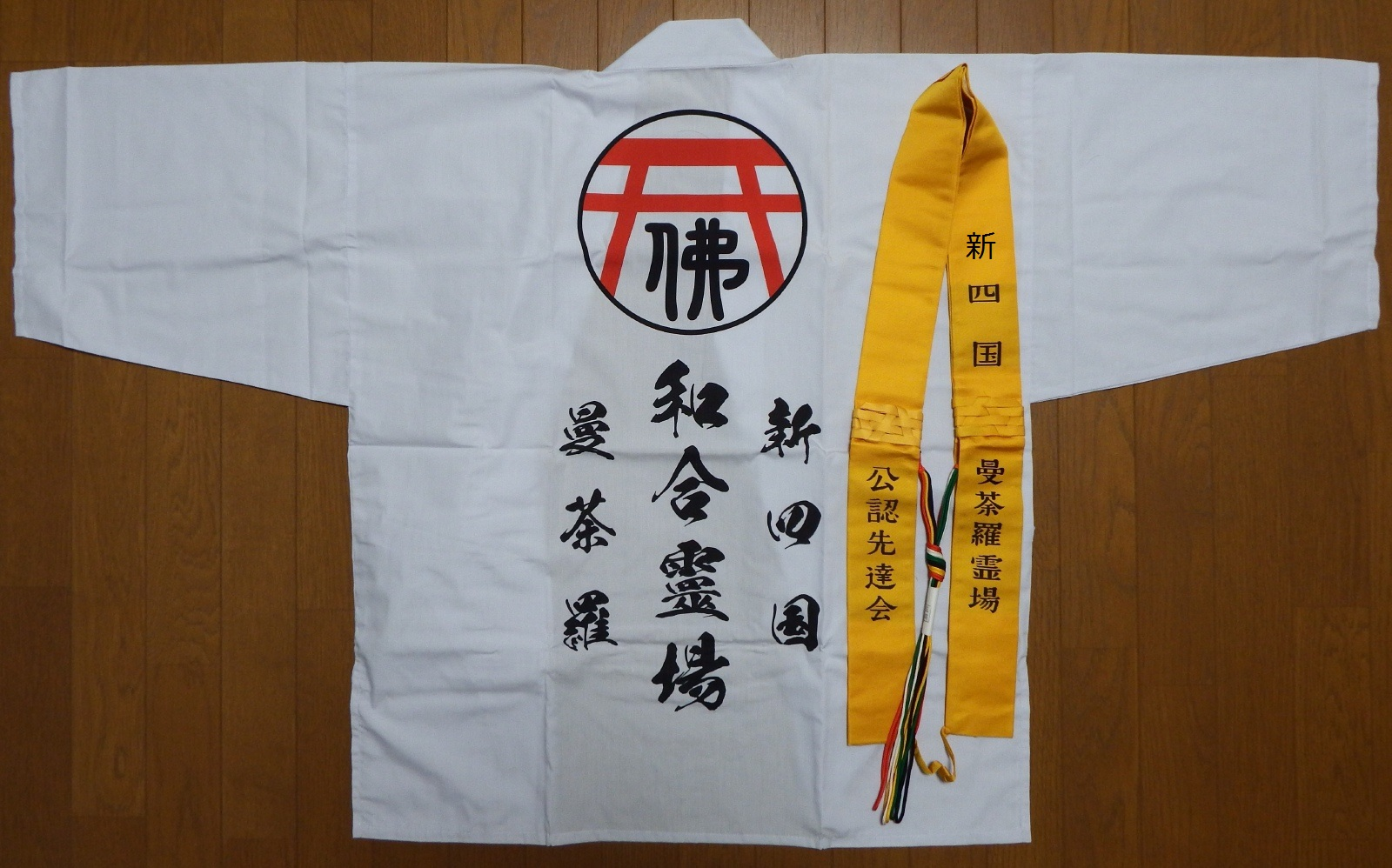 新四国曼荼羅霊場の白衣と袈裟